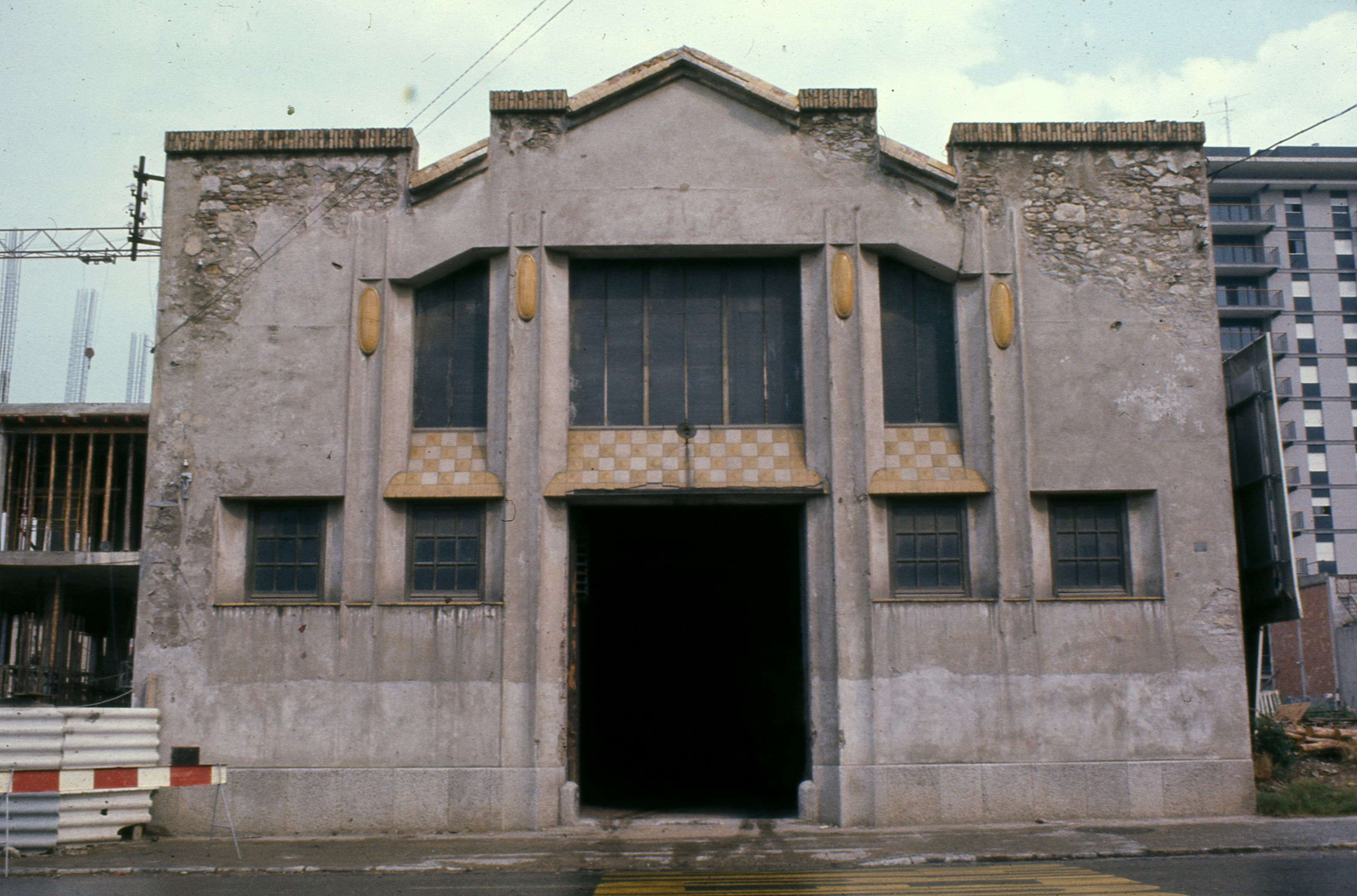 Magatzem Ensesa que es trobava a Carretera Barcelona, a la ciutat de Girona. Actualment desaparegut.